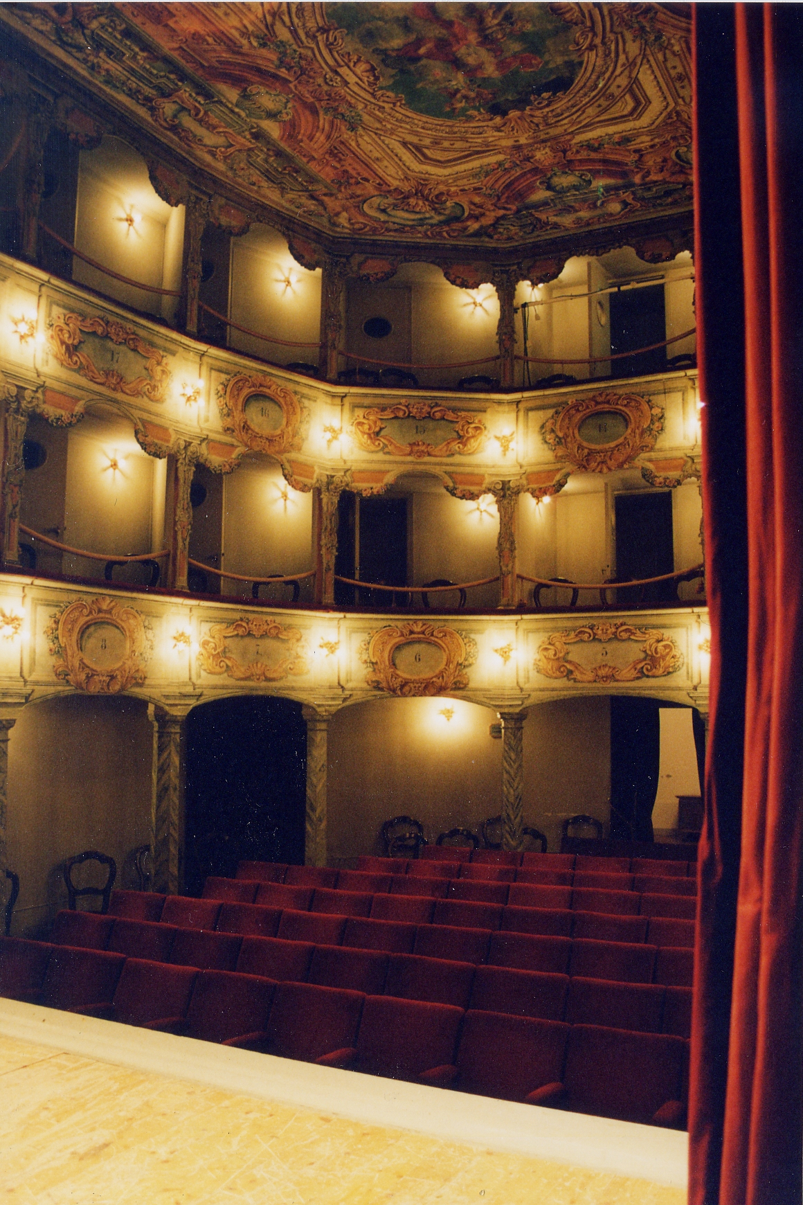 Vista dell'interno del Teatro Comunale di Penna San Giovanni (MC)